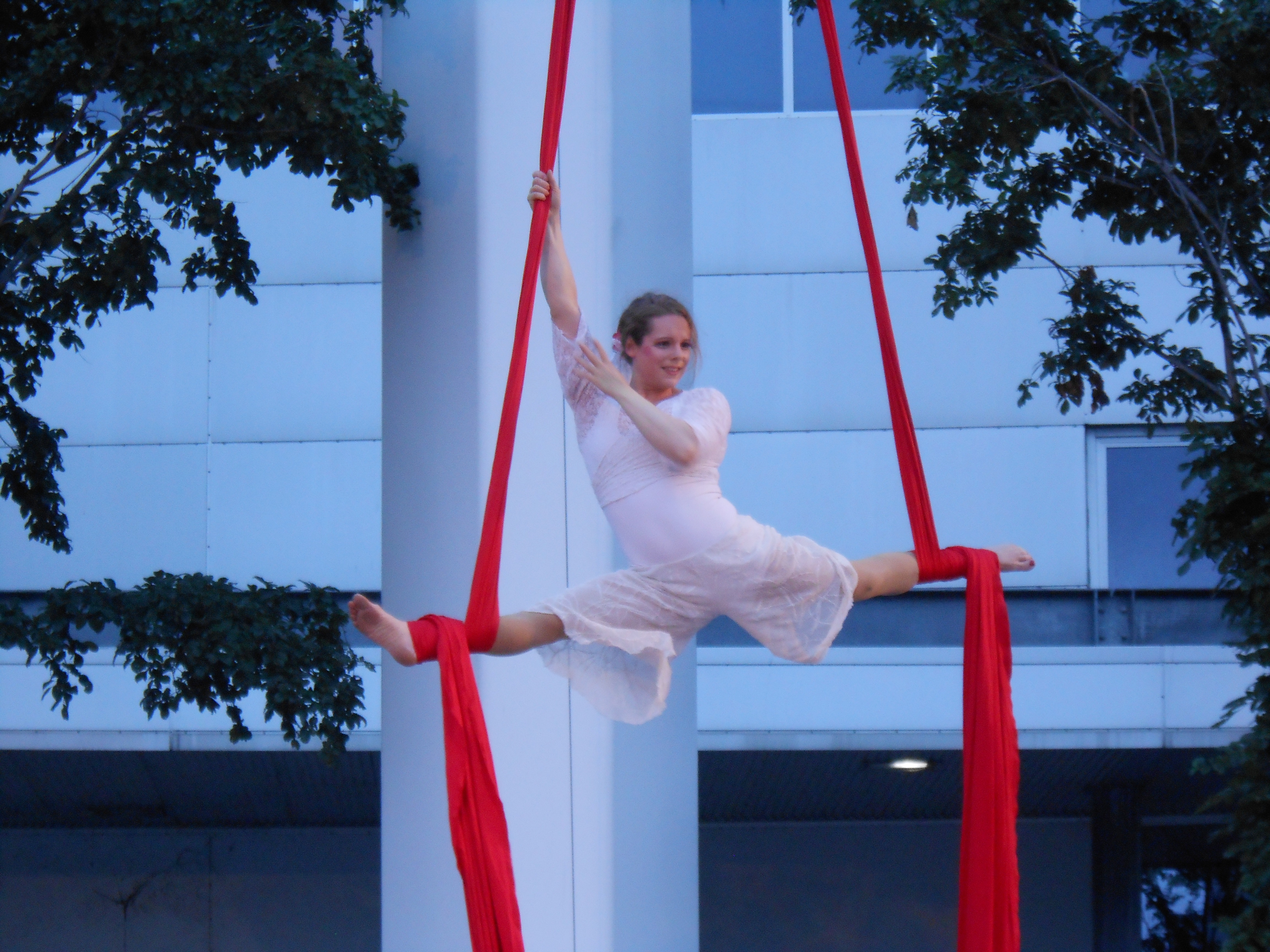 Spectacle de haute voltige, à la promenade des Artistes du Quartier des spectacles de Montréal offert par des étudiants de l'École nationale de cirque. Vidéo